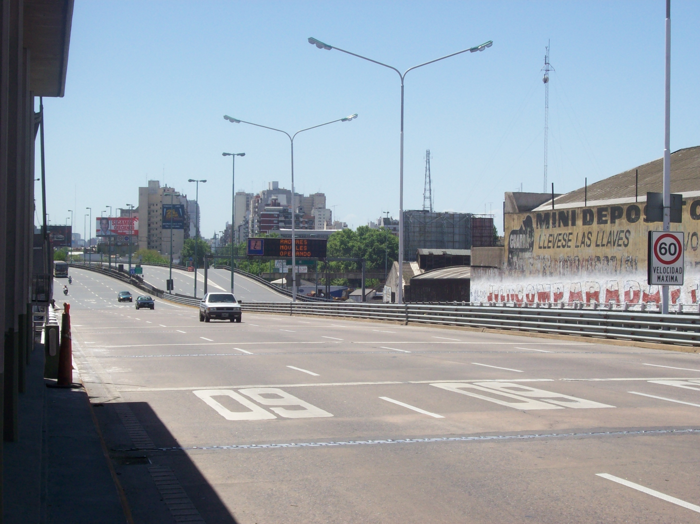 Autopista Nueve de Julio sur, que forma el acceso norte al Nuevo Puente Pueyrredón visto desde la cabecera. Barrio de Barracas, Buenos Aires.